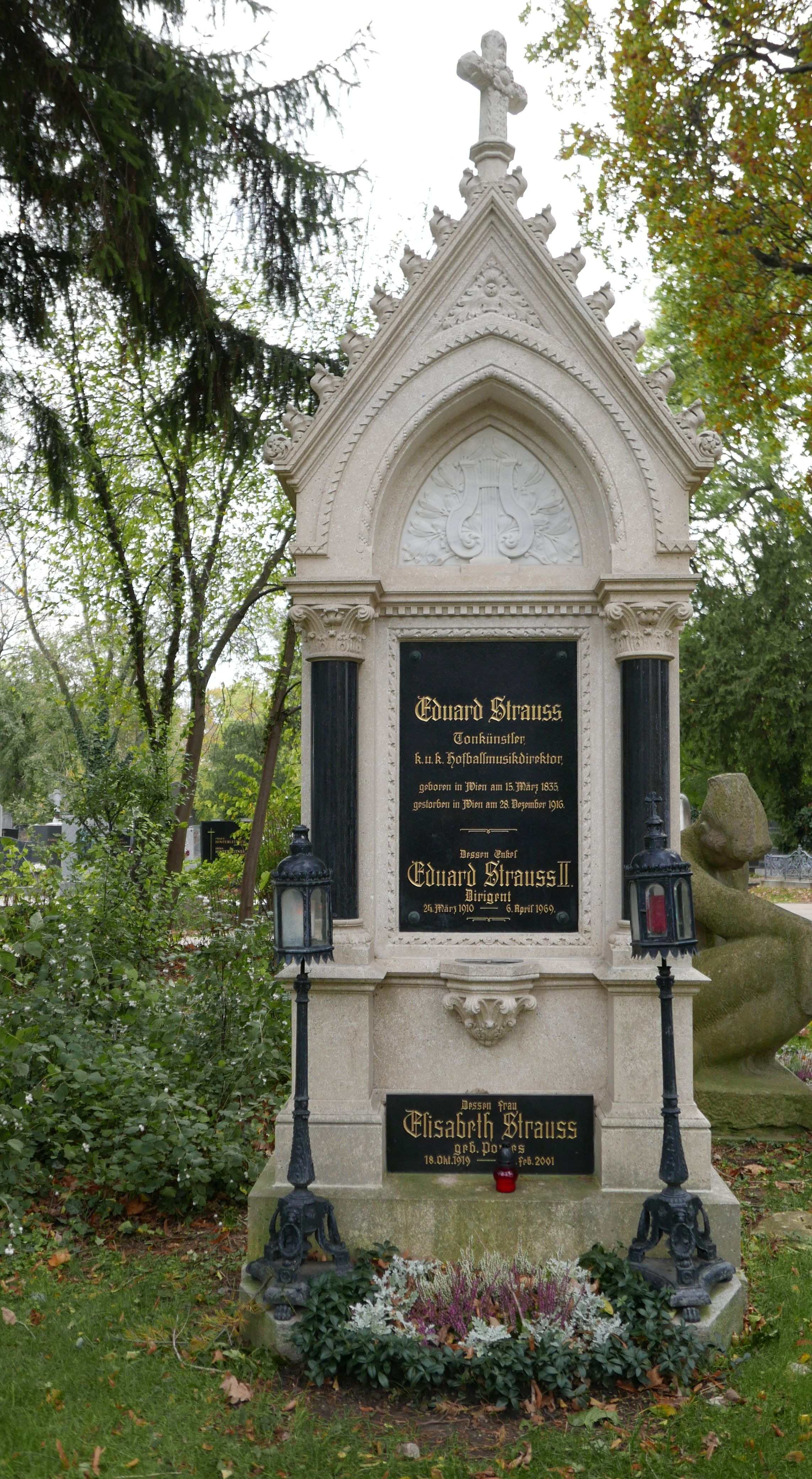 Wiener Zentralfriedhof Allerheiligen 2017: Grab des österreichischen Komponisten Eduard Strauß (1835-1916) und Eduard Strauss II (1910-1969)